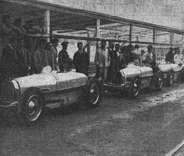 Concurrants du GP d'Espagne 1933.